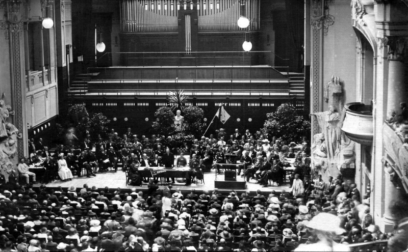 13. Esperanto-Weltkongress, Prag 1921. Blick Richtung Podium in den Veranstaltungssaal